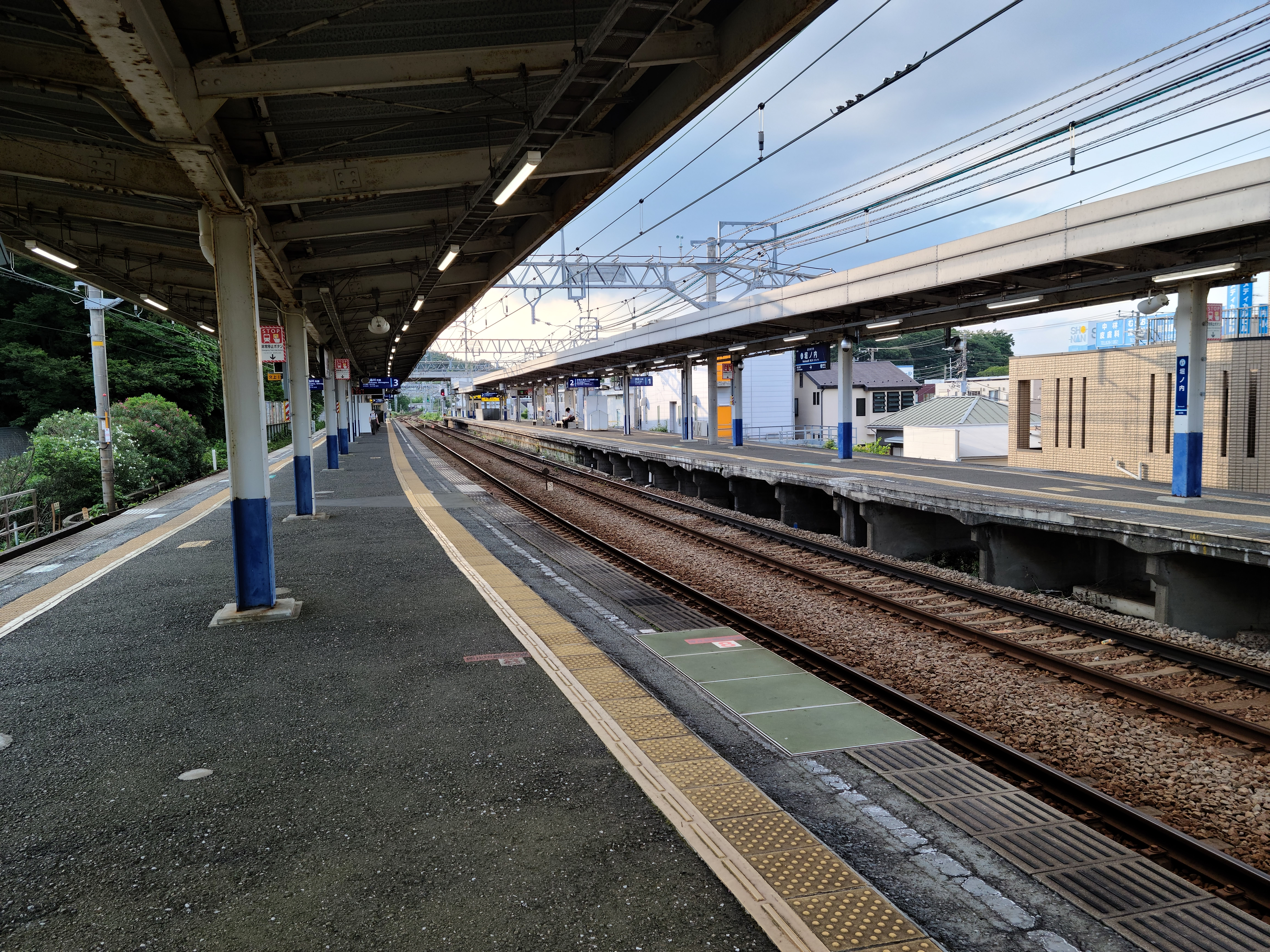 堀ノ内駅のホームです。